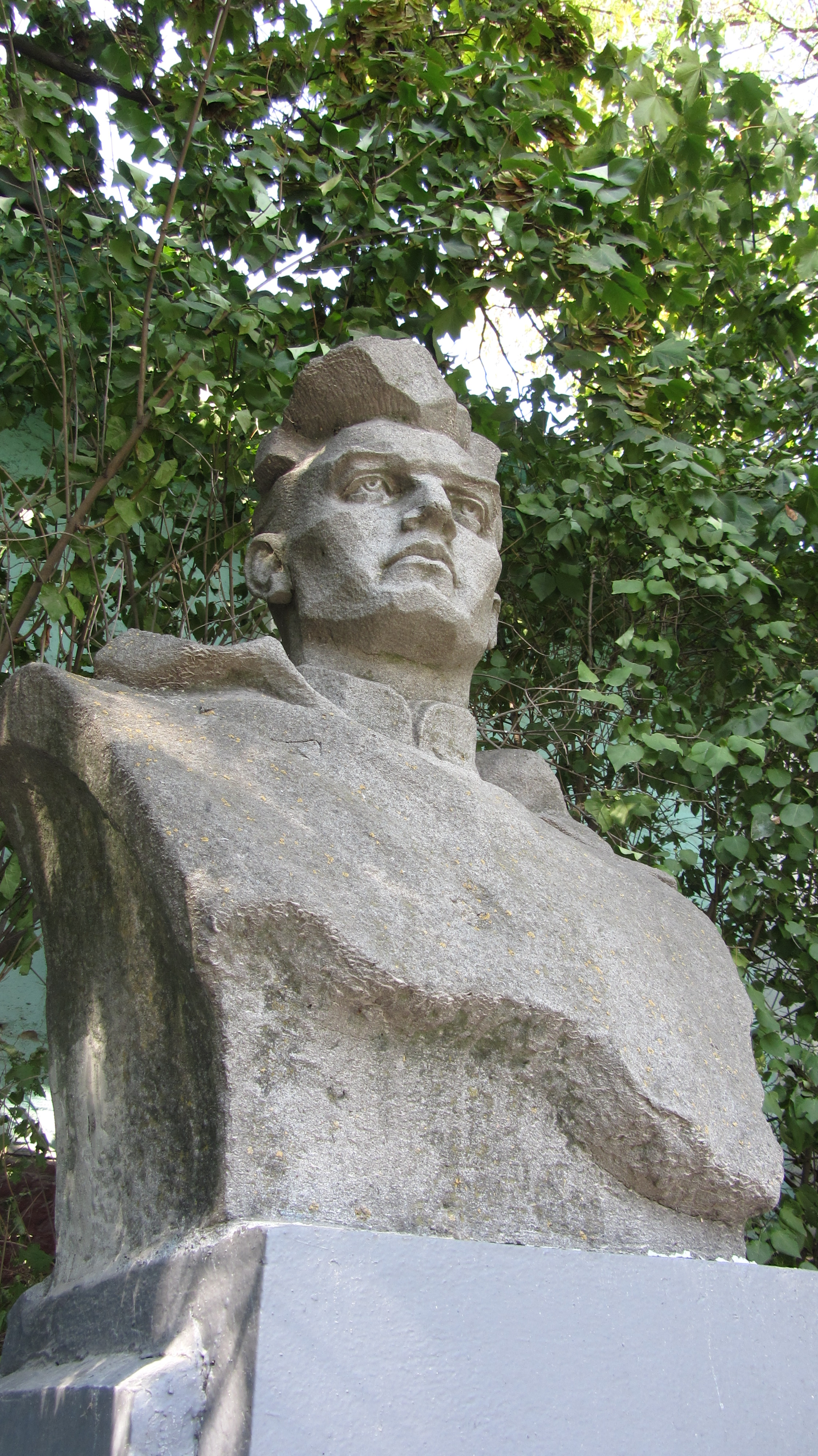 Бюст Героя Радянського Союзу К. Ф. Ольшанського (Автори: скульптор О.О. Здіховський, архітектор В.В. Пластіков ), Миколаїв, територія Миколаївського морського торговельного порту